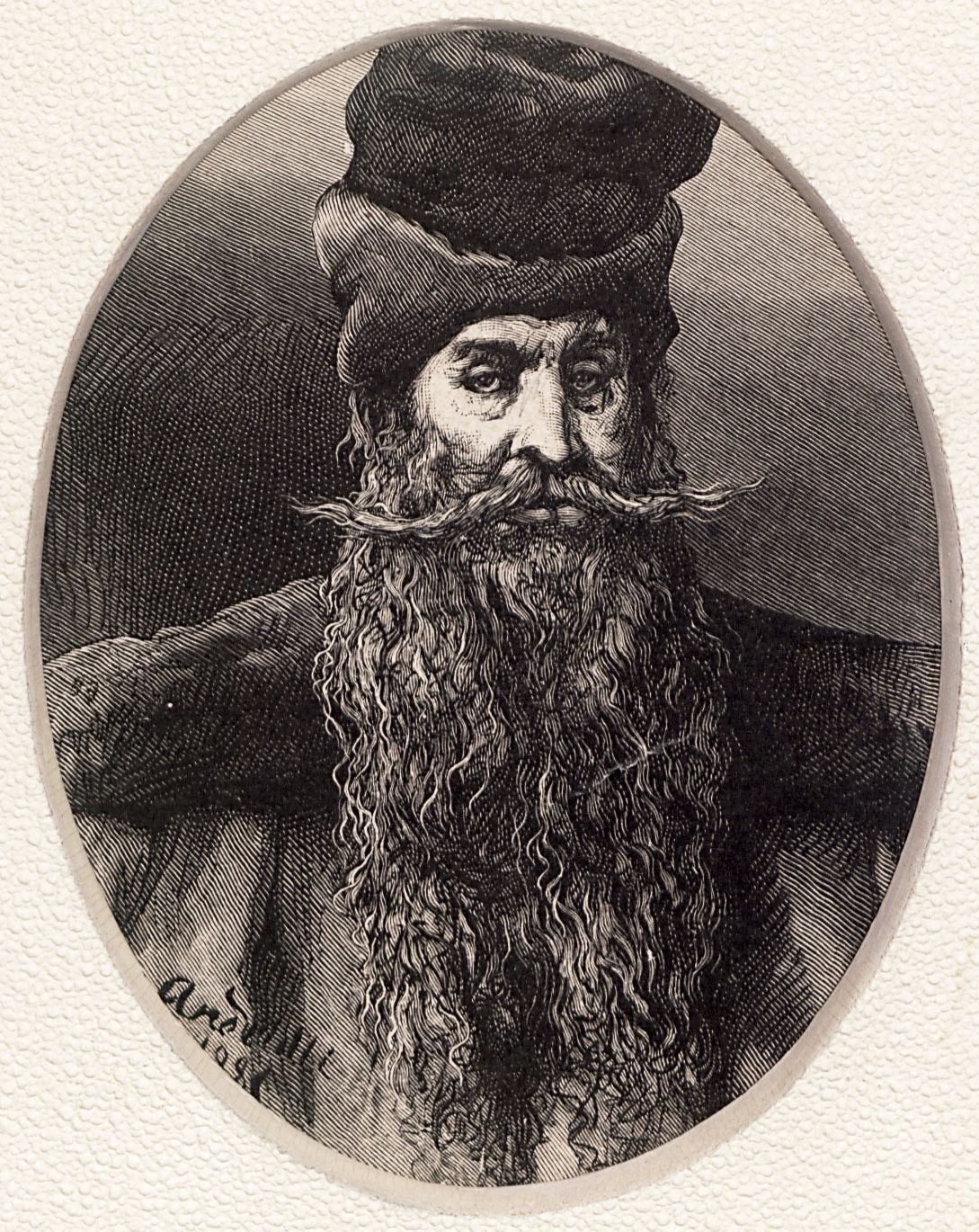 Olbracht Łaski (drzeworyt)